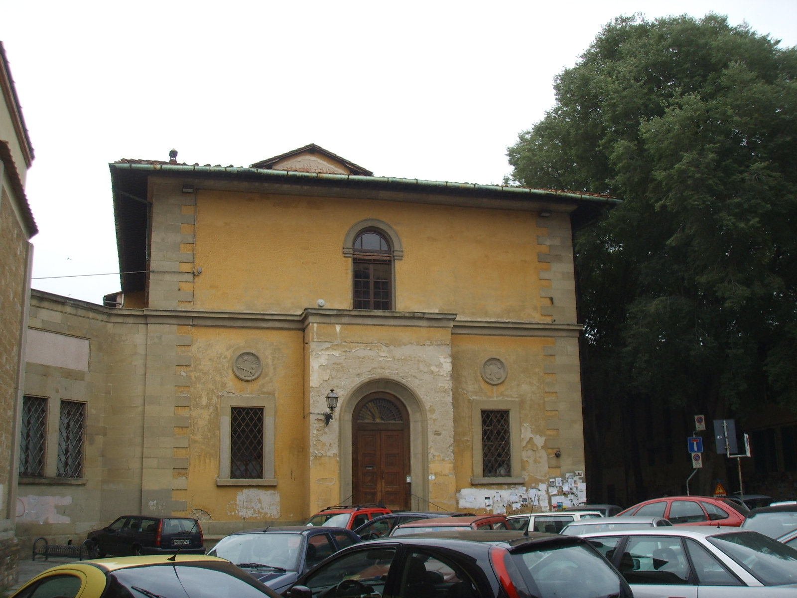 Casa del mutilato